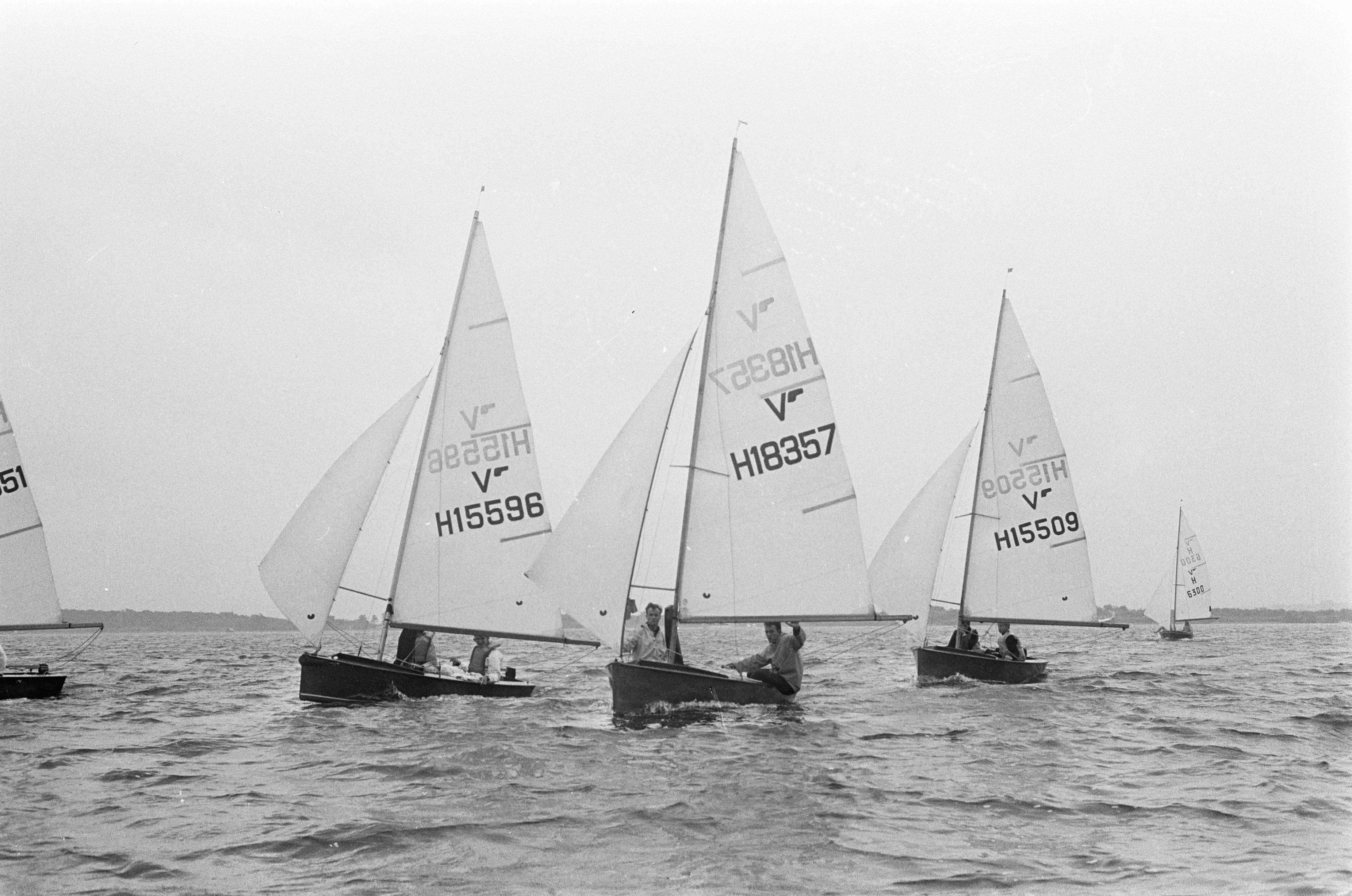 Collectie / Archief : Fotocollectie Anefo Reportage / Serie : Internationale zeilwedstrijden Braassemermeer. Beschrijving : De Vaurienklasse in actie Datum : 8 juli 1967 Locatie : Braassemermeer Trefwoorden : wedstrijden, zeilen, zeilschepen Fotograaf : Fotograaf Onbekend / Anefo Auteursrechthebbende : Nationaal Archief Materiaalsoort : Negatief (zwart/wit) Nummer archiefinventaris : bekijk toegang 2.24.01.05 Bestanddeelnummer : 920-4877 Reacties Geplaatst door Anoniem op 06 april 2015 - 15:30. Vaurien, geen Vrijheid!